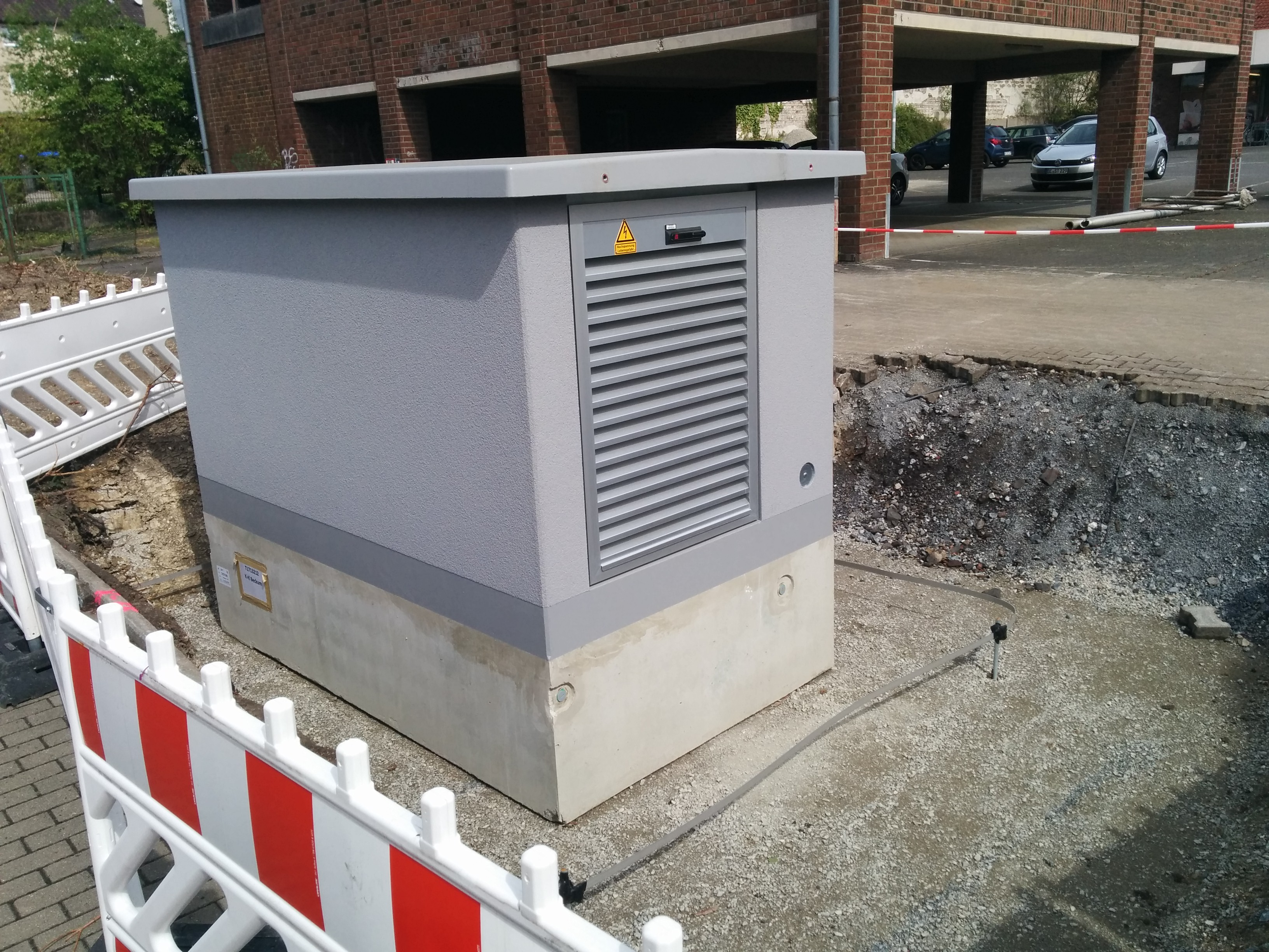 Gerade aufgestellte Trafostation mit sichtbarem Fundamenterder